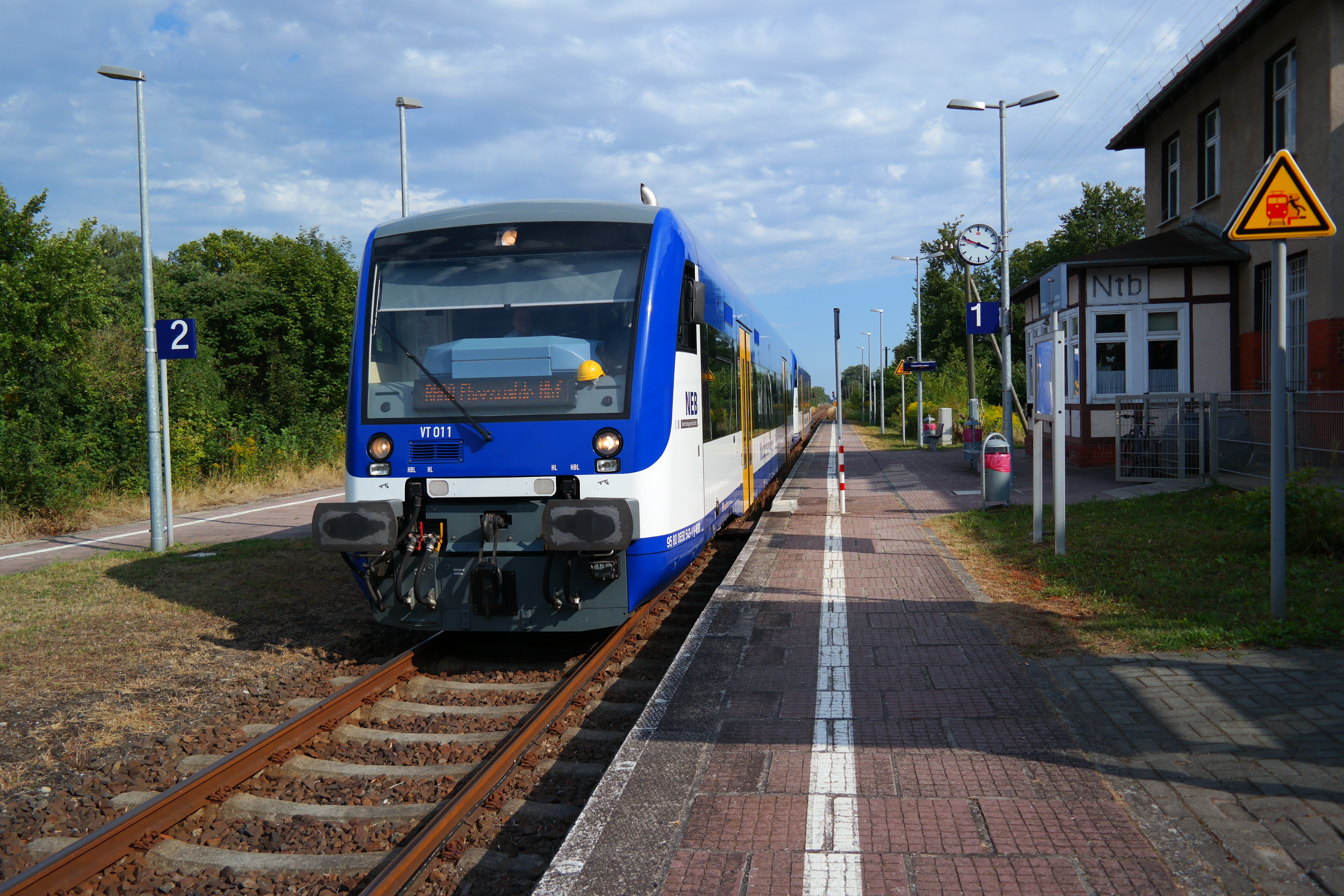 Ein Triebenwagen der NEB (Niederbarnimer Eisenbahn) im Bahnhof Neutrebbin.